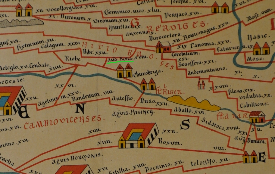 extrait de la table de peutinger